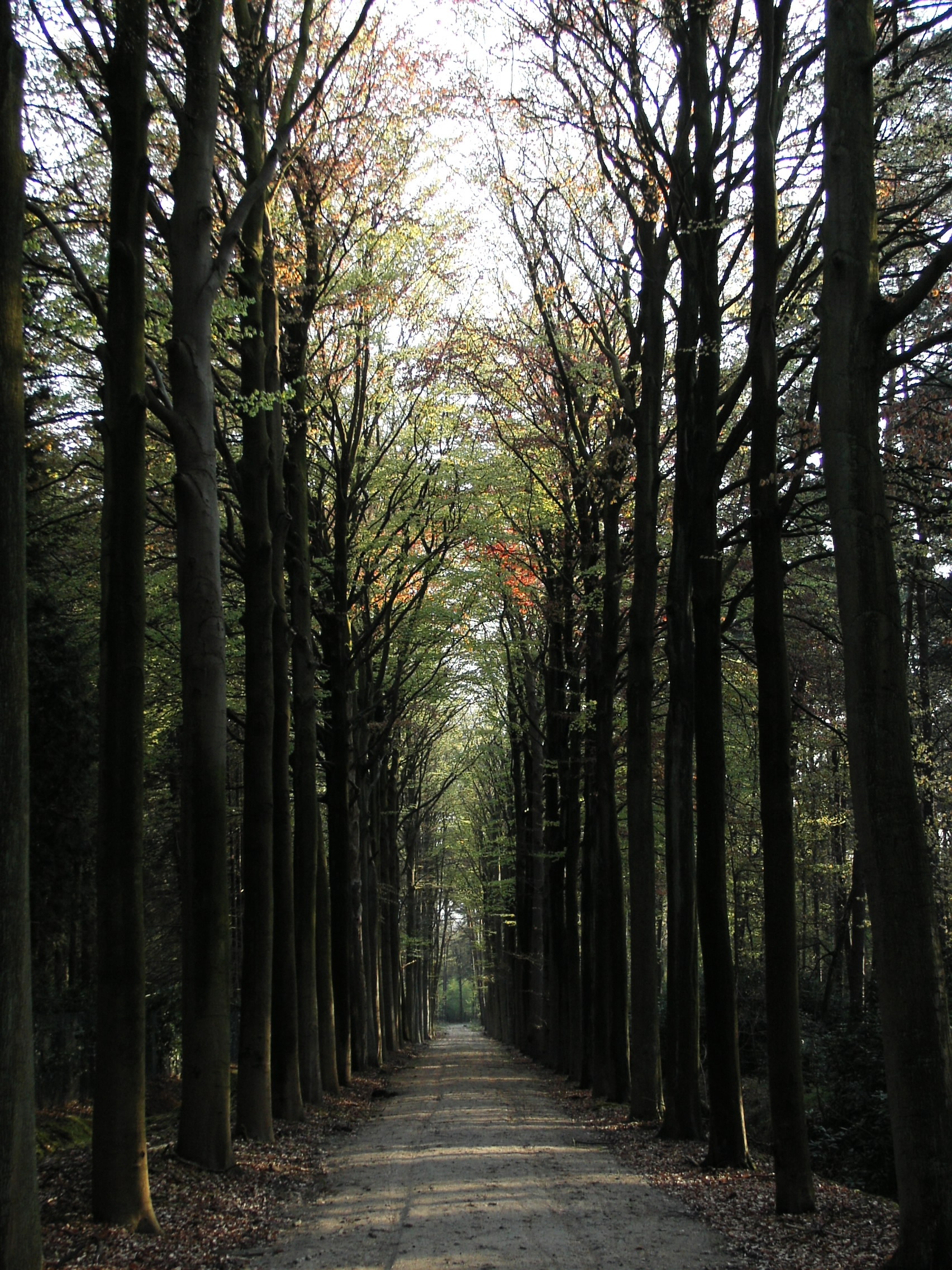 Description Beukendreef in De Inslag, Brasschaat (Antwerpen)Date 30 April 2006Source Own workAuthor Johan Neegers Beukendreef in De Inslag, Brasschaat (Antwerpen)